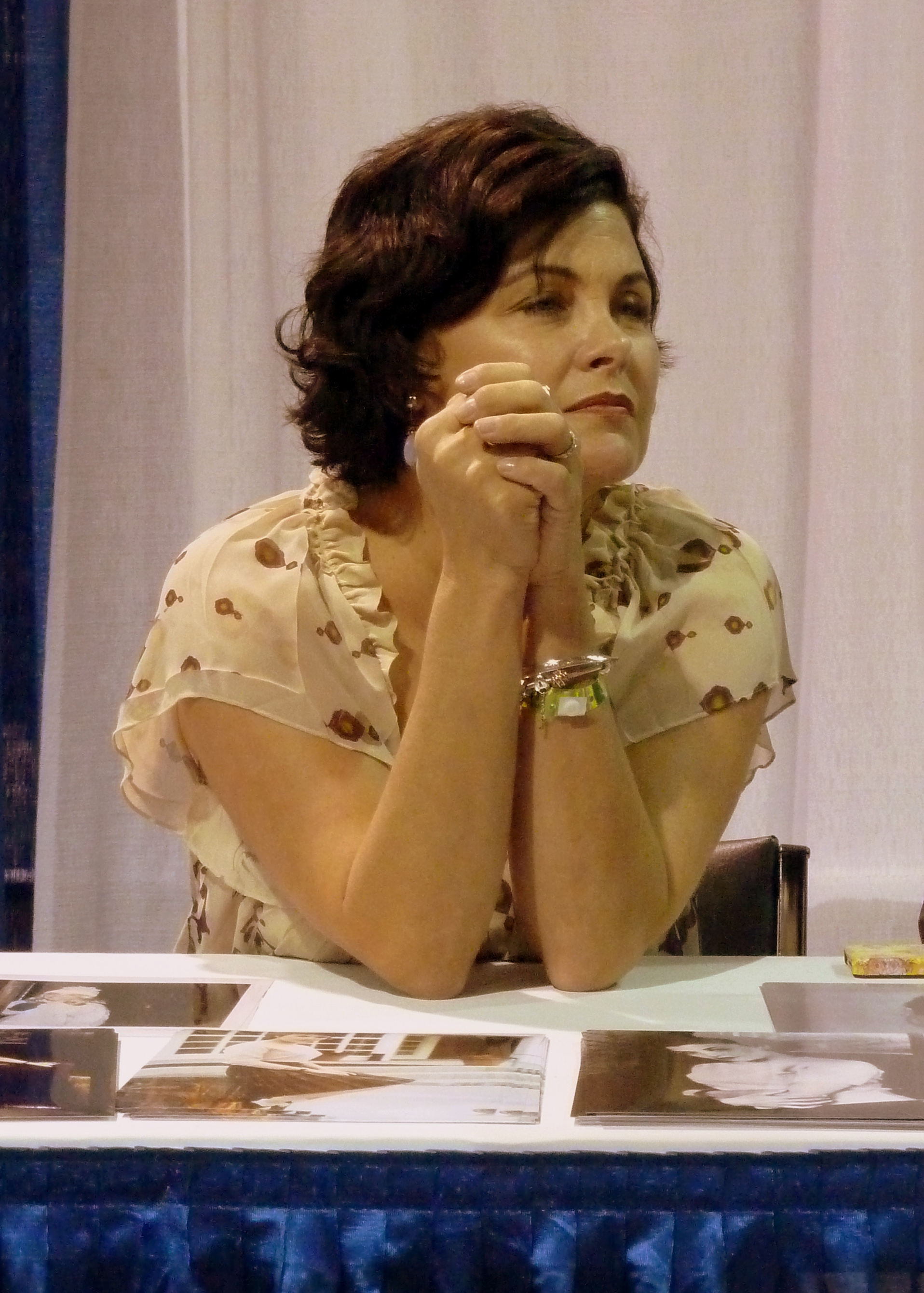 Sherilyn Fenn 01